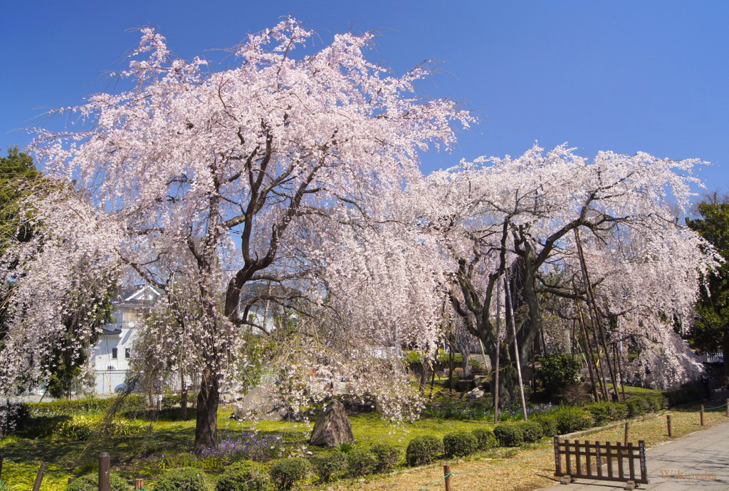 東郷寺（府中）のしだれ桜